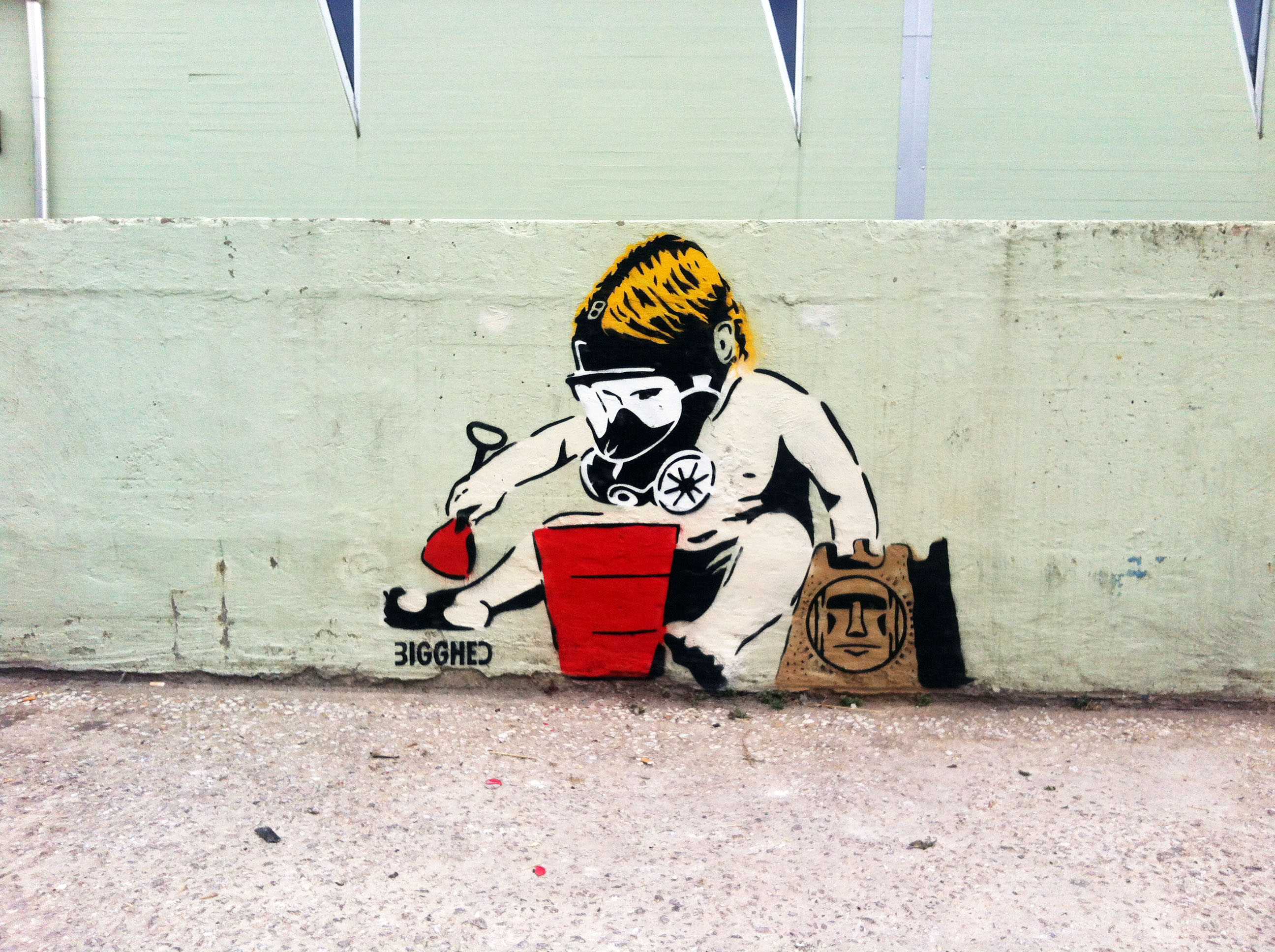 bambino com maschera antigas che gioca